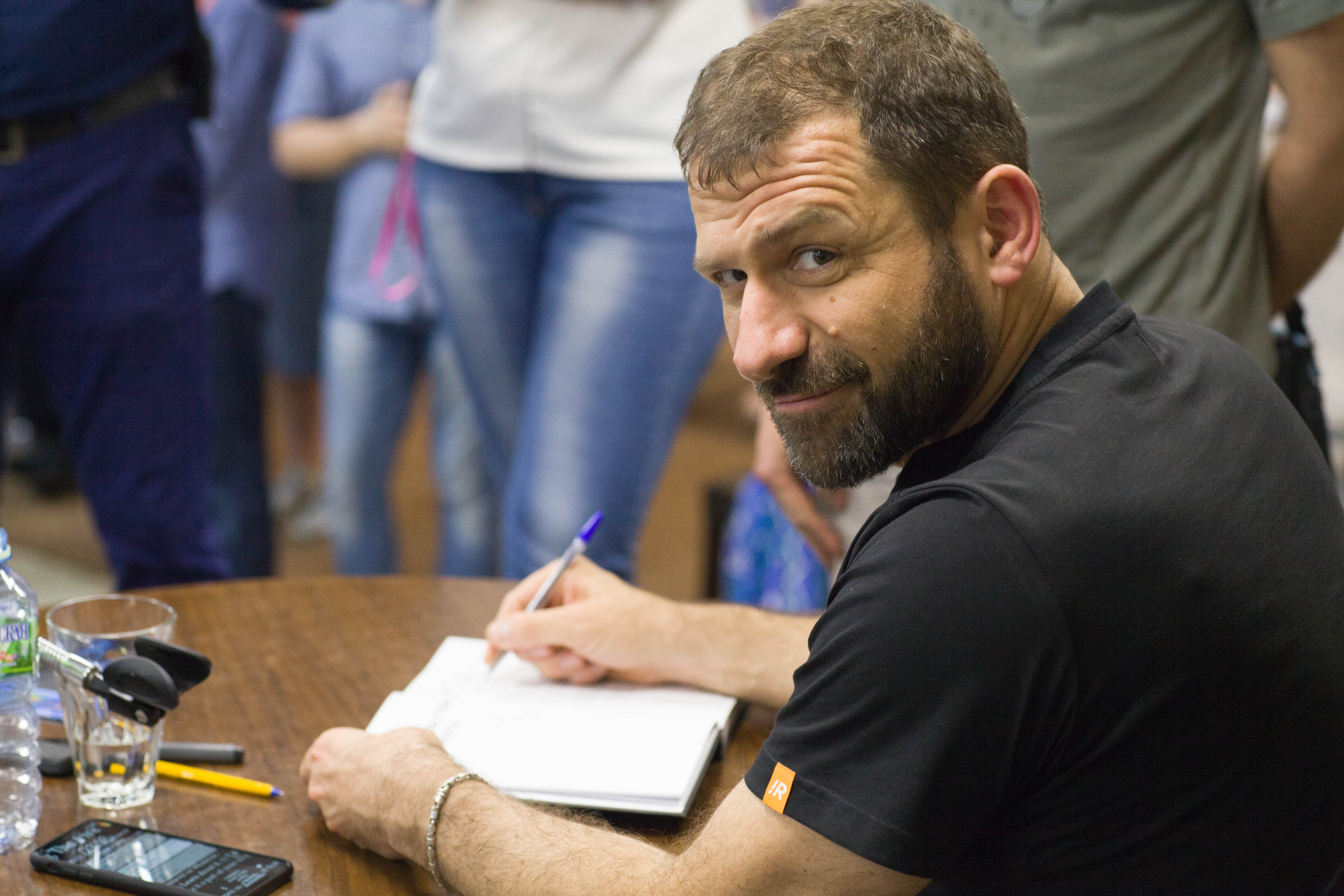 Игорь Рыбаков на презентации книги "Ток. Как совершать выгодные шаги без потерь" в Московском доме книги на Новом Арбате